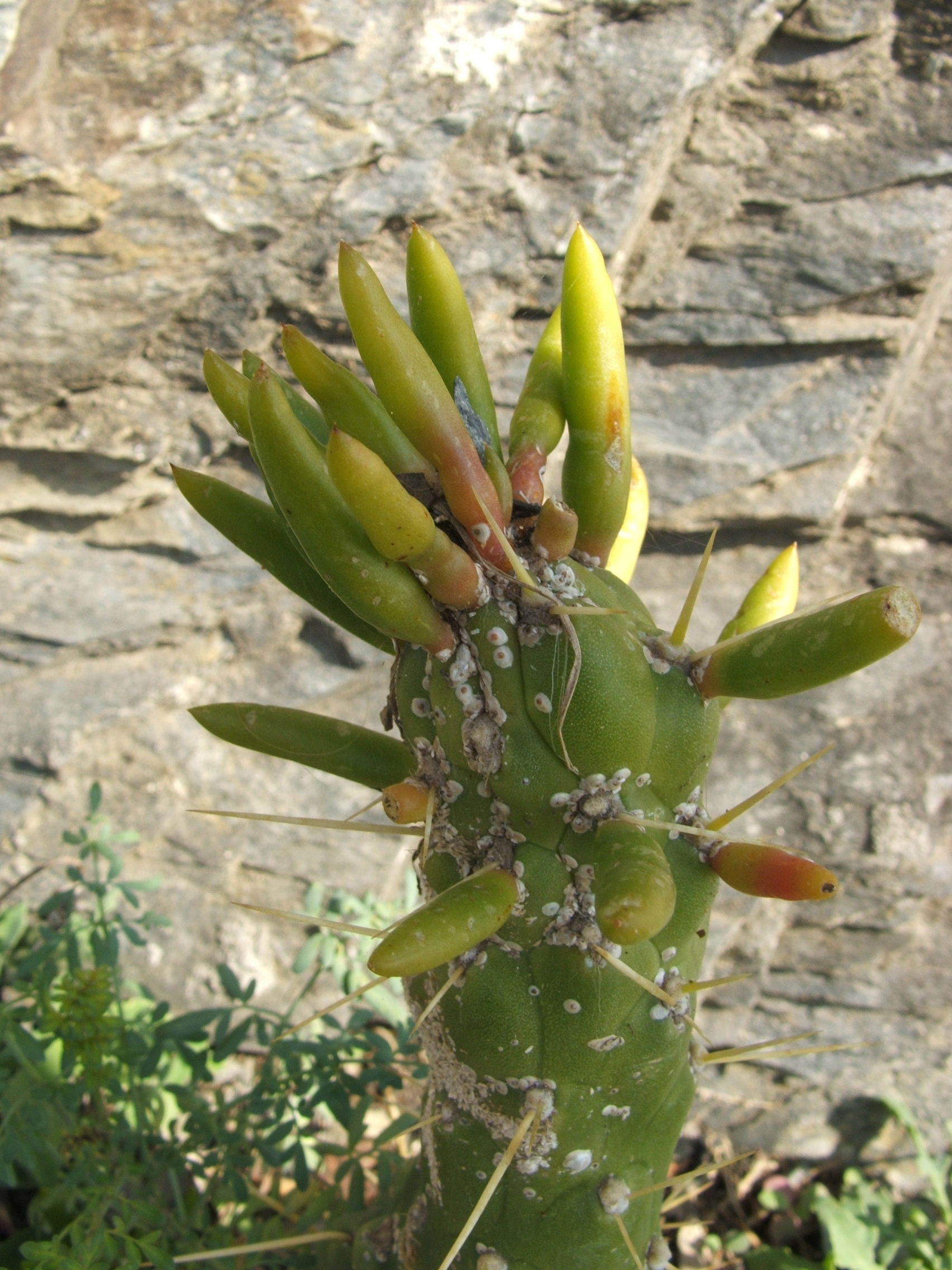 Immagine dalle Cinque Terre: Via dell'Amore Manarola - vegetazione